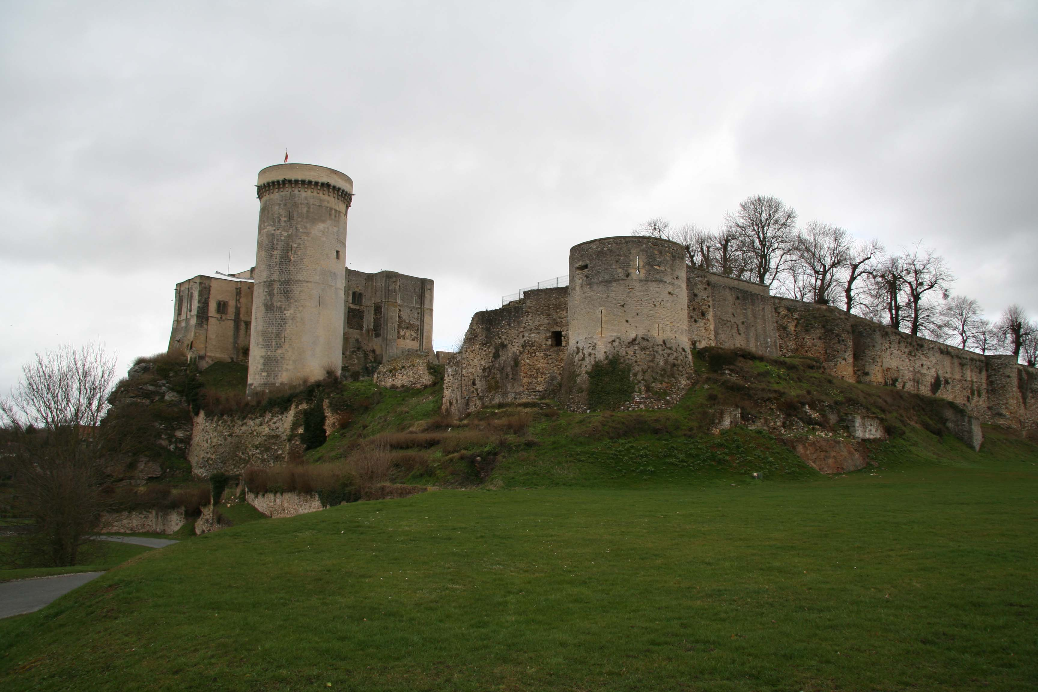 Château Guillaume-Le-Conquérant (William the Conqueror). Falaise, France.